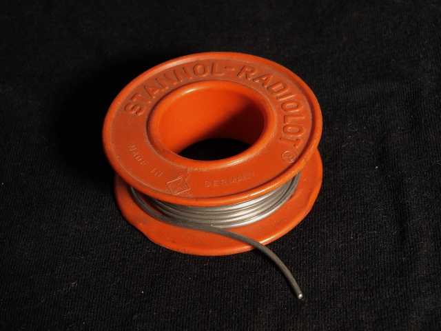 Spule mit Lötzinn (Radiolot) der Firma Stannol, Wuppertal. Konfektionierung MItte 70er Jahre